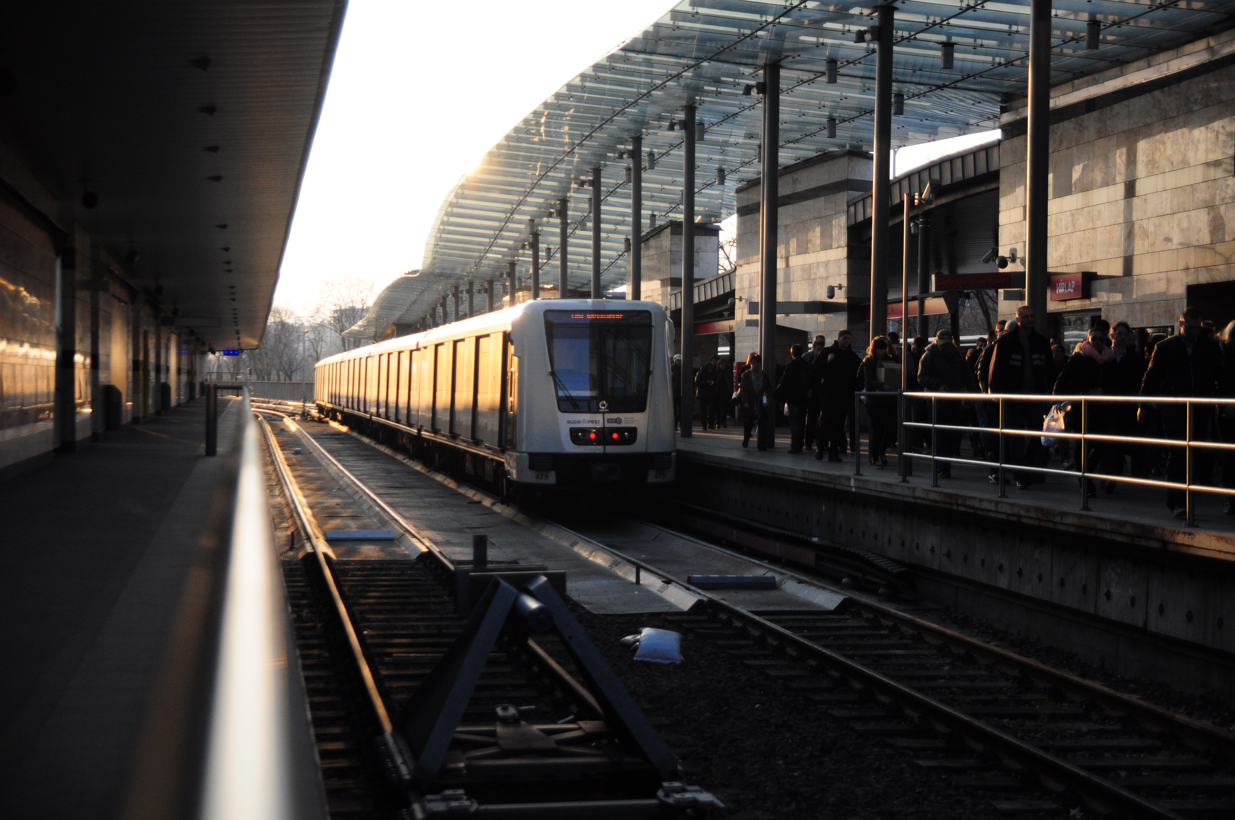 Budapest, metró 2, Örs vezér tere